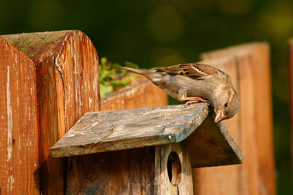 Nieuwsgierige mus